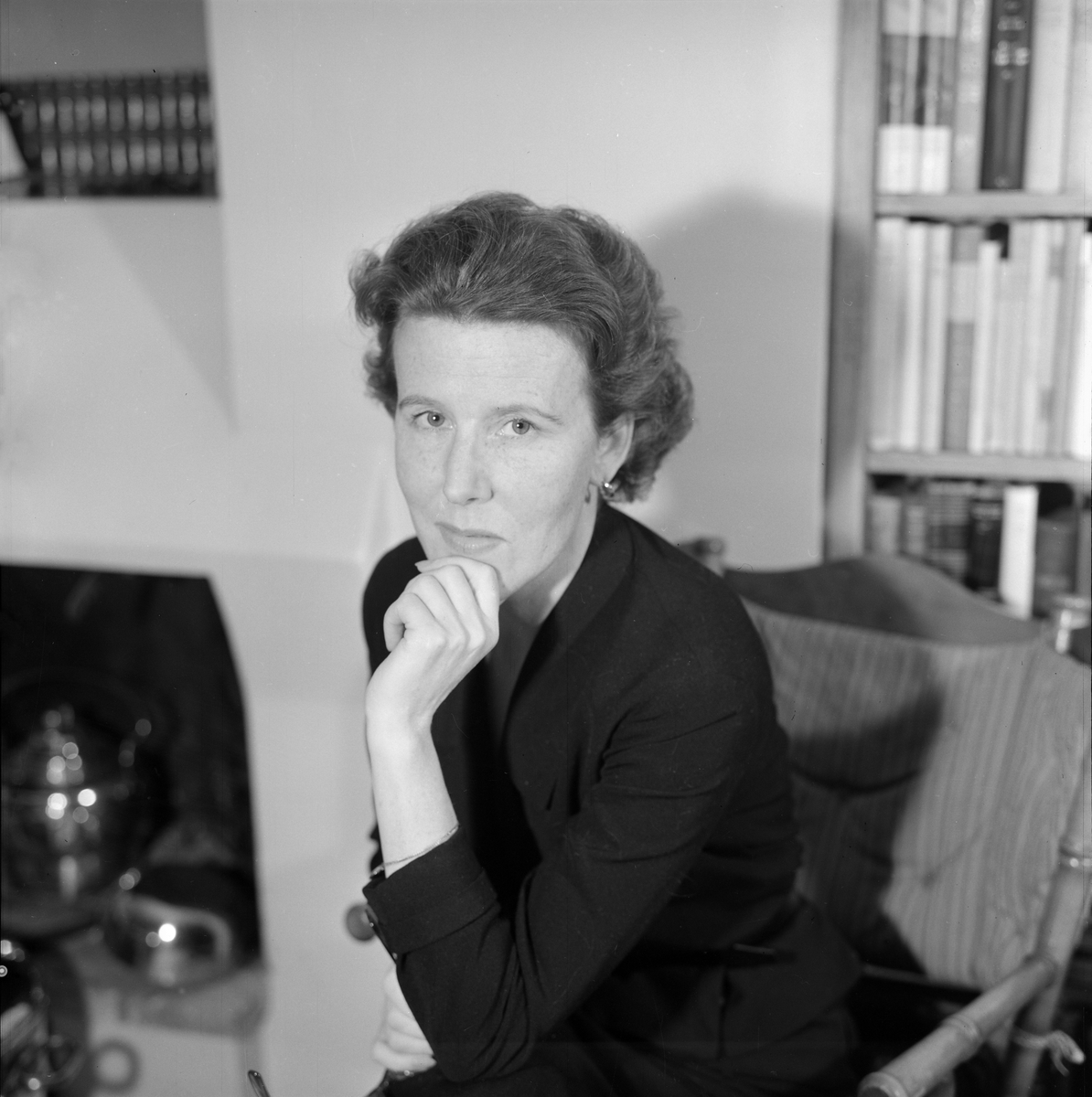 Gerd Nyquist (født 15. mars 1913 i Kristiania, død 23. november 1984 i Oslo) var en norsk forfatter.